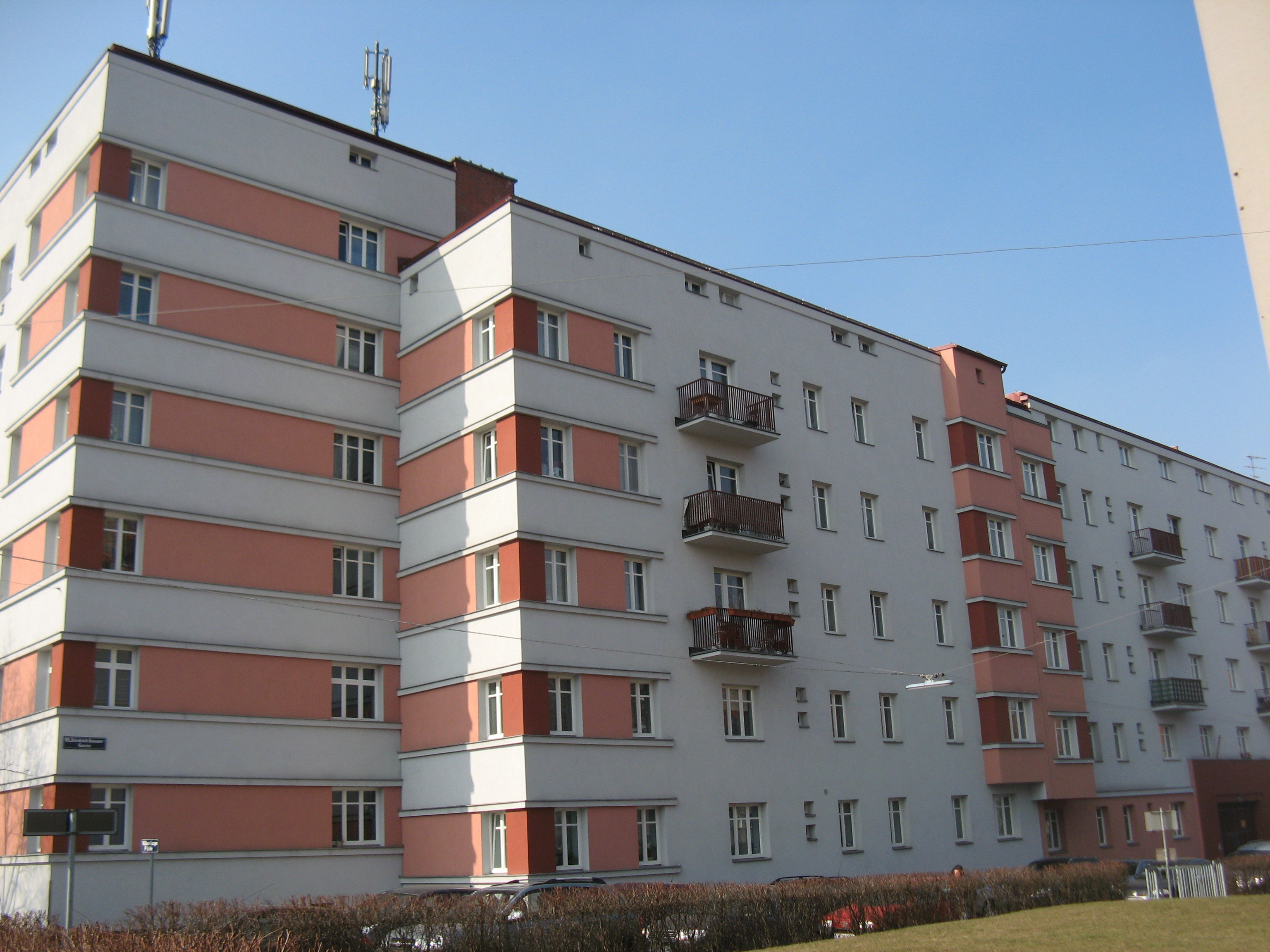 Gemeindebau (1929) von Anton Valentin, Friedrich-Knauer-Gasse 8, Wien-Favoriten